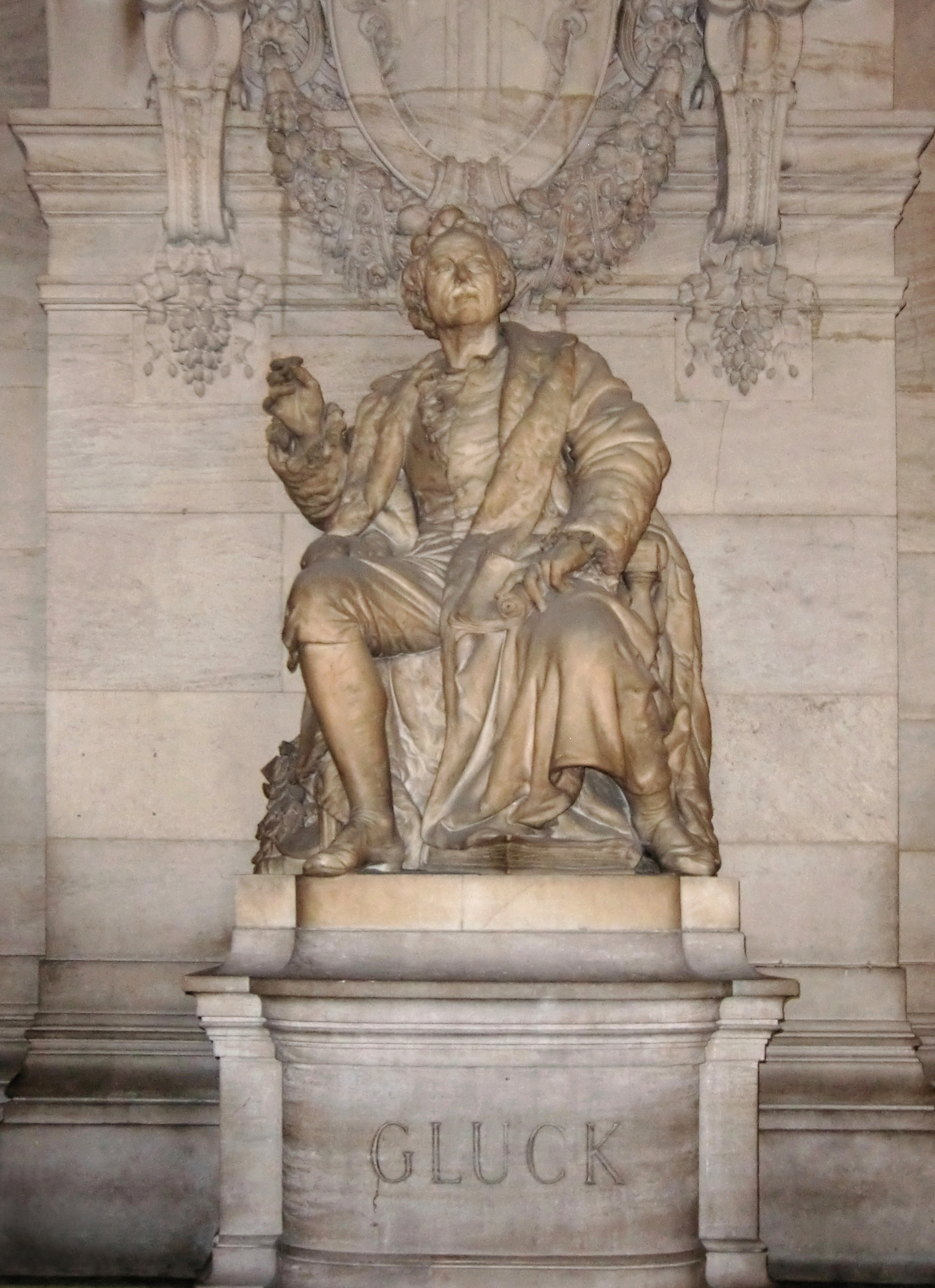 Statue de Christoph Willibald Gluck à l'Opéra de Paris